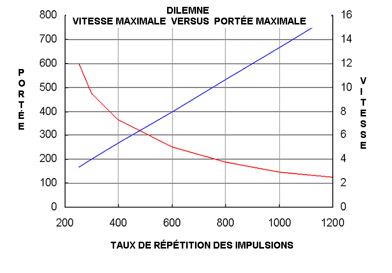 Dilemme entre la portée maximale non-ambigüe (rouge) et la vitesse maximale (bleu) que peut résoudre un radar à impulsions selon la variation du taux de répétition des impulsions. Ces courbes sont faites pour un radar de 5 cm de longueur d'onde.